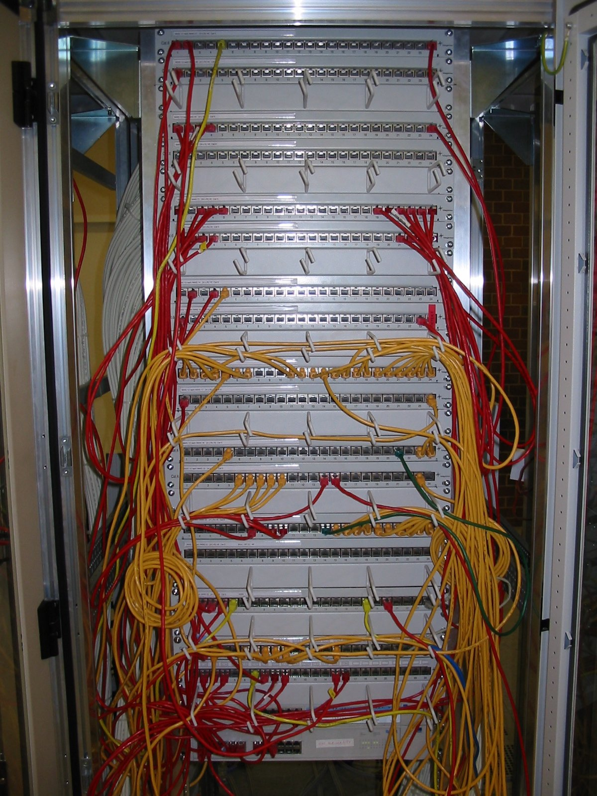 Patchpanel, selbst fotografiert